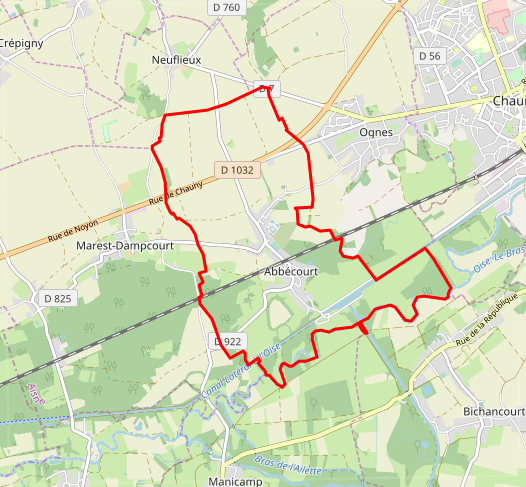 carte réalisée sur umap This map may be incomplete, and may contain errors. Don't rely solely on it for navigation.